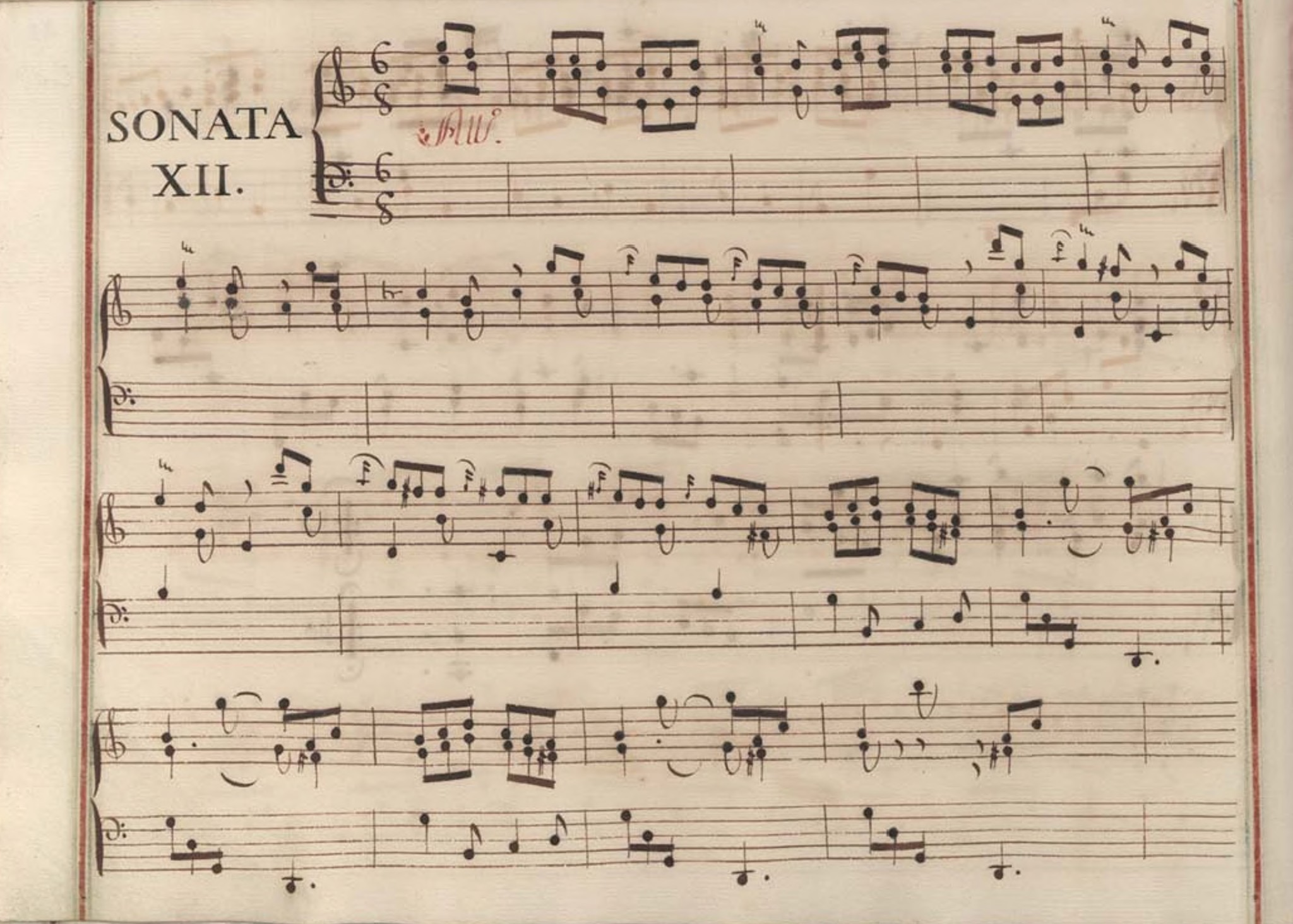 La sonate K. 159, telle qu'elle se présente dans le manuscrit de Venise, volume I no. 12.